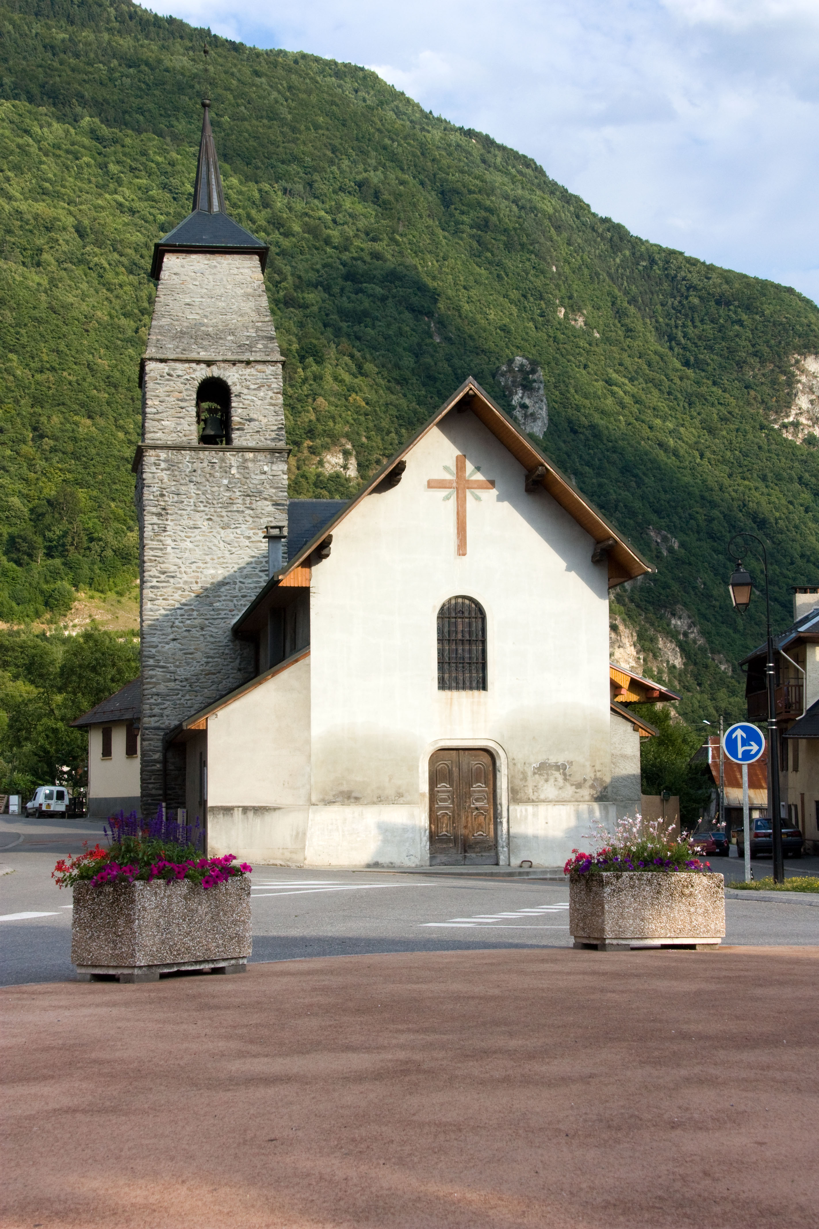 Saint-Avre, Savoie, France Eglise de Saint-Avre